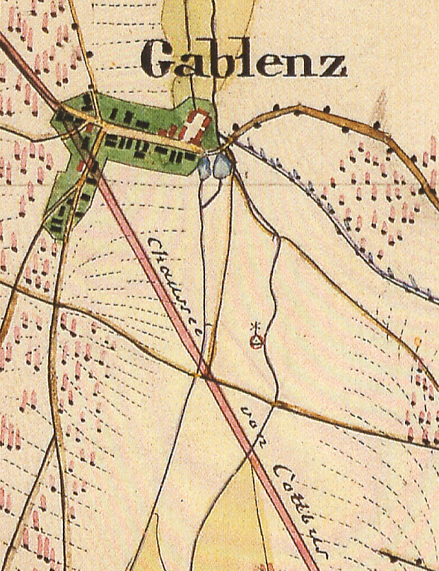 Gablenz, Ortsteil der Gemeinde Neuhausen/Spree, Lkr. Spree-Neiße, Brandenburg, Ausschnitt aus dem Urmesstischblatt 4353 Döbern von 1845